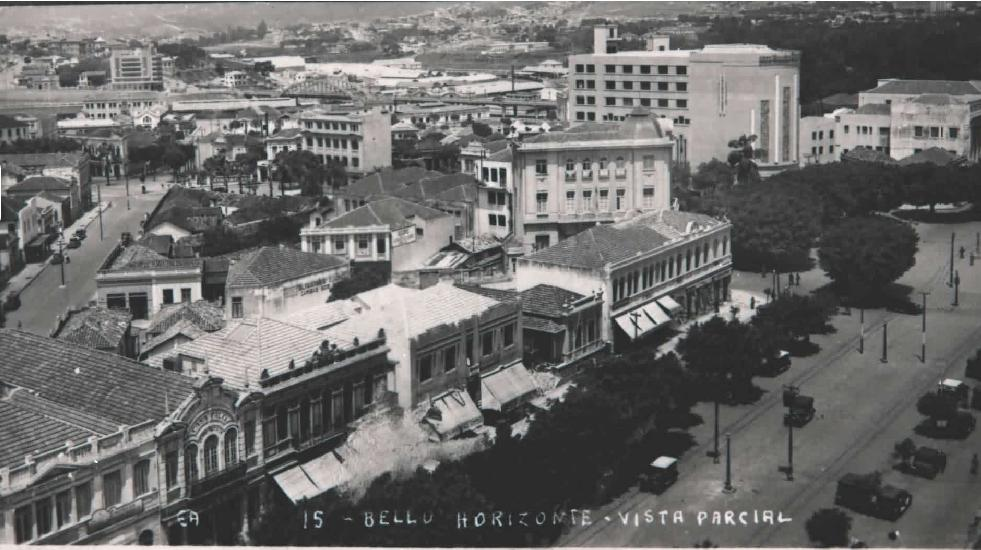 Vista Pracial de Belo Horizonte na década de 30